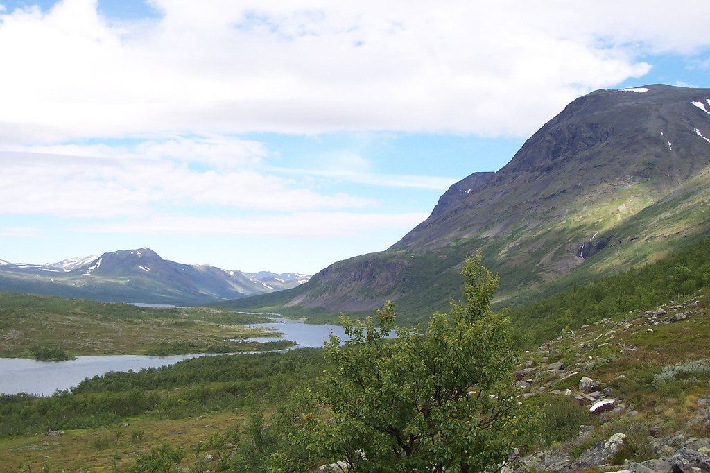 Nedre delen av Tarradalen Lower part of Tarra Valley